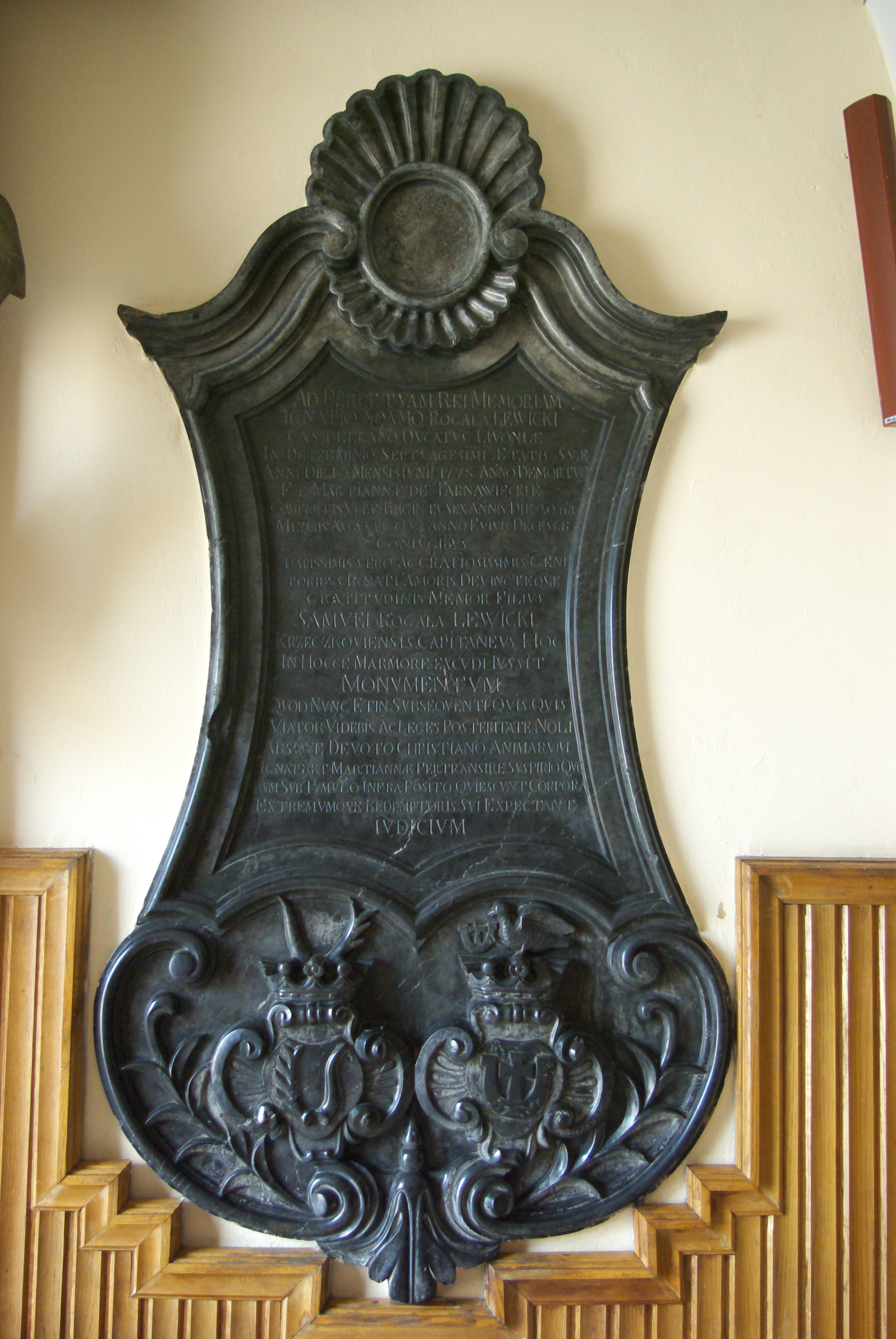 Późnobarokowe epitafium z czarnego marmuru Ignacego Adama Lewickiego (kasztelana inflackiego w latach 1769-1778, zm. 1788) i jego żony Marcjanny z Tarnawieckich (zm. 1754) z inskrypcją w języku łacińskim (1613). Tablicę ufundował ich syn Samuel Rogala-Lewicki